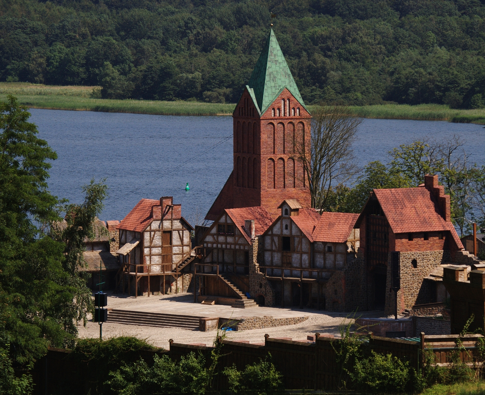 Die Naturbühne in Ralswiek, Ort der Störtebecker-Festspiele